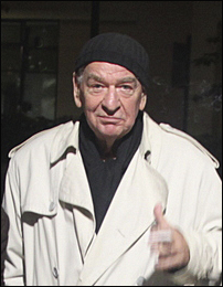 Der Architekt Gerd Pieper im Oktober 2013 bei einer Dokumentarfilm-Voraufführung in der Landesvertretung Mecklenburg-Vorpommern.